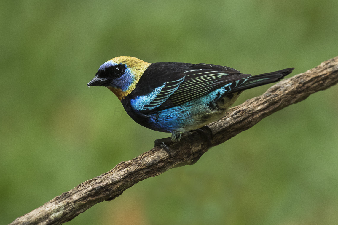 Golden-hooded Tanager - Sarapiqui - Costa Rica_MG_0002-3